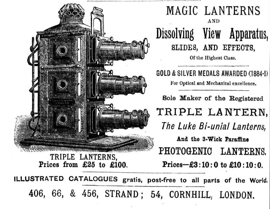 Magic lantern or slide projector